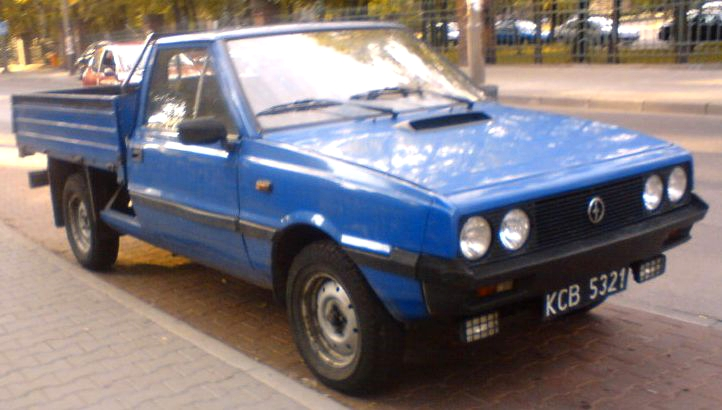 FSO Polonez Truck ST 1.9 D z lat 1989-1992.